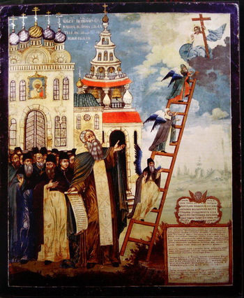 Икона св. Иоанн Лествичник